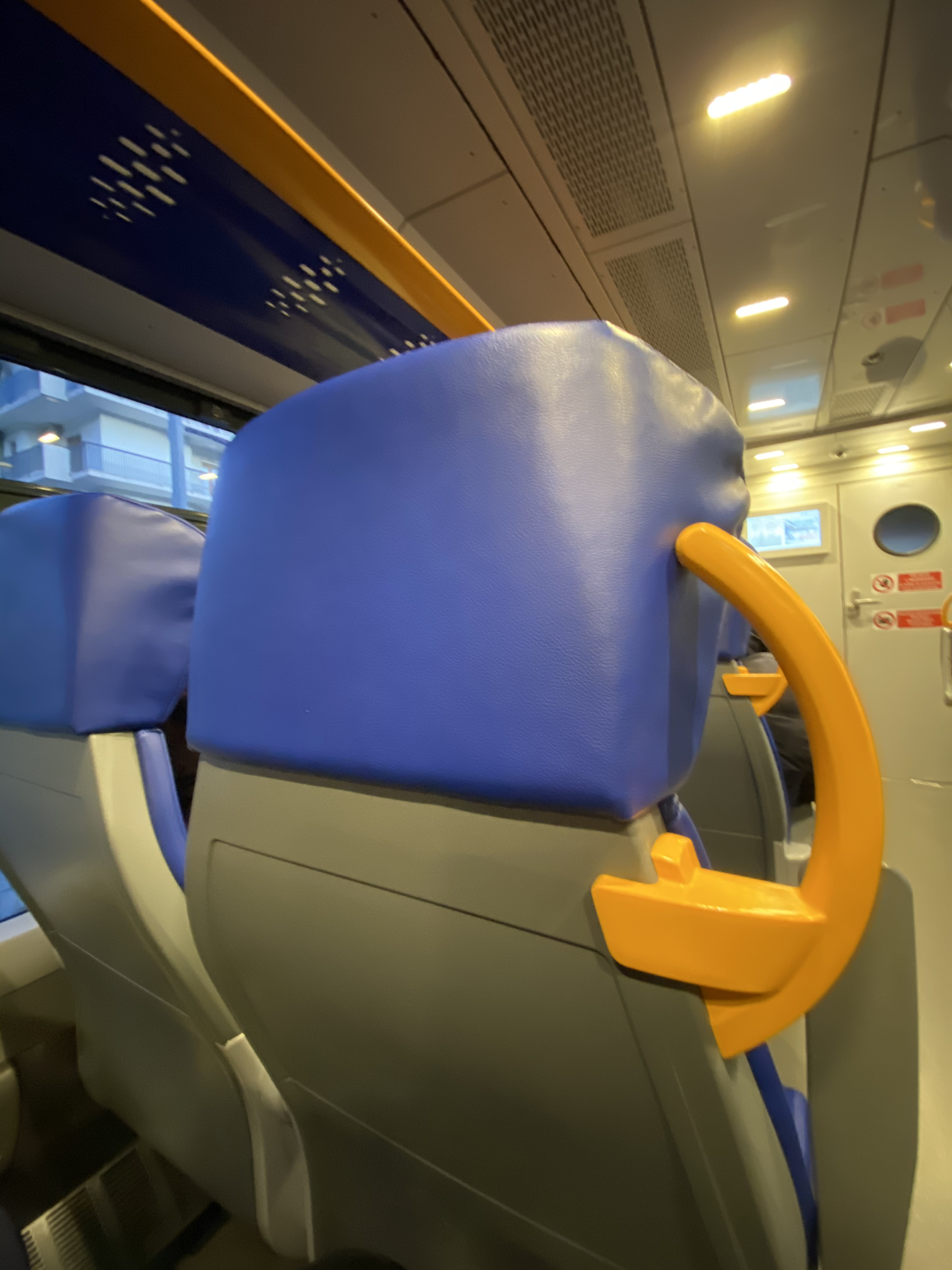 Salerno metropolitan railway service